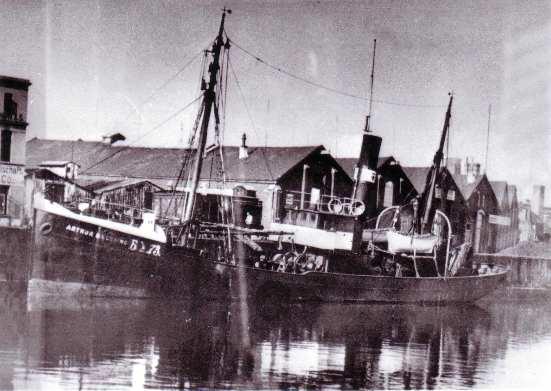 Fotografie des Fischdampfers Arthur Breusing. 1907 Stapellauf, 1907–1914 Hochseefischerei Bremerhaven, 1914-1918 Kaiserliche Marine, 1918 nach Minentreffer gesunken